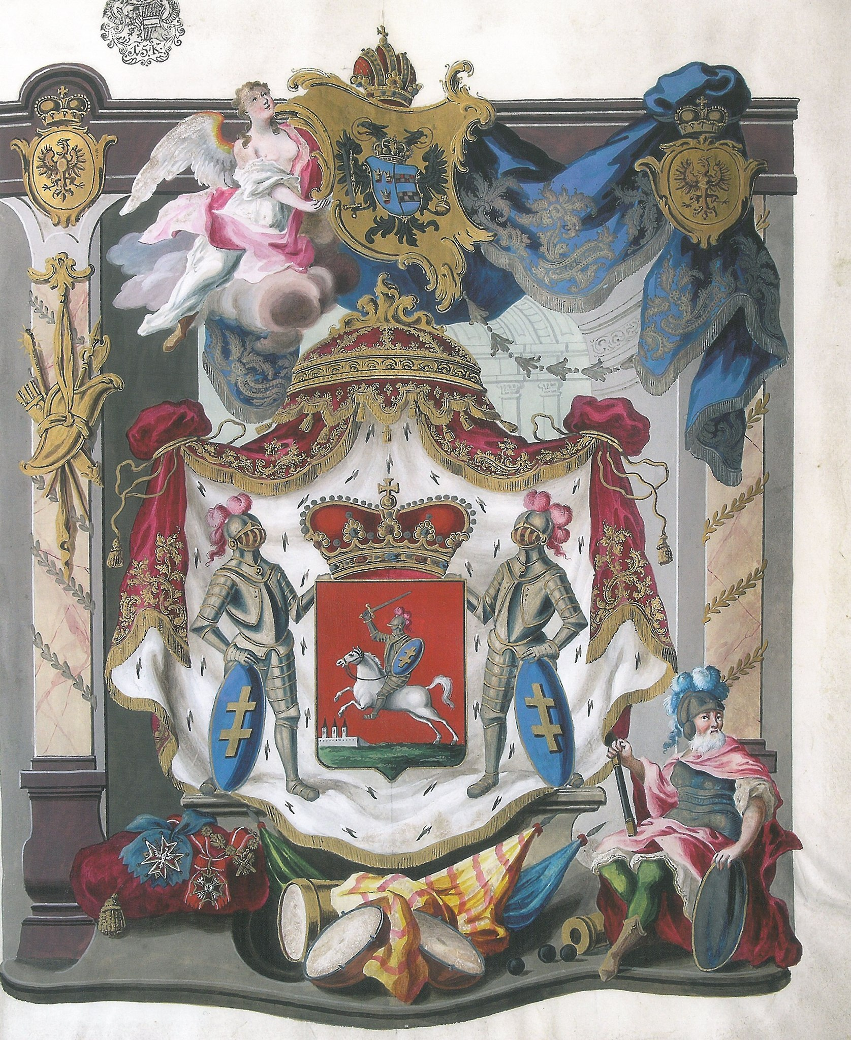 Беларуская (тарашкевіца): Ілюстрацыя з дакумэнта, які даводзіць княскі тытул Чартарыйскіх (Čartaryjski) з гербам Пагоняй (Pahonia)